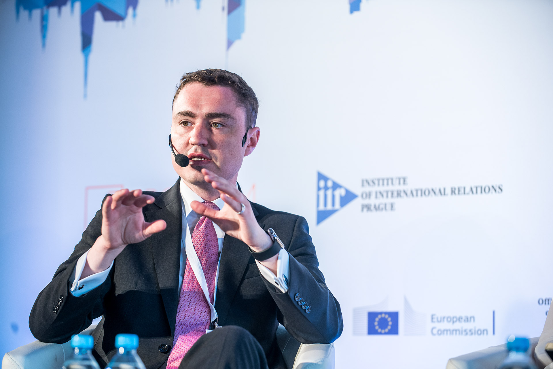 Taavi Roivas, Prague European Summit 2017